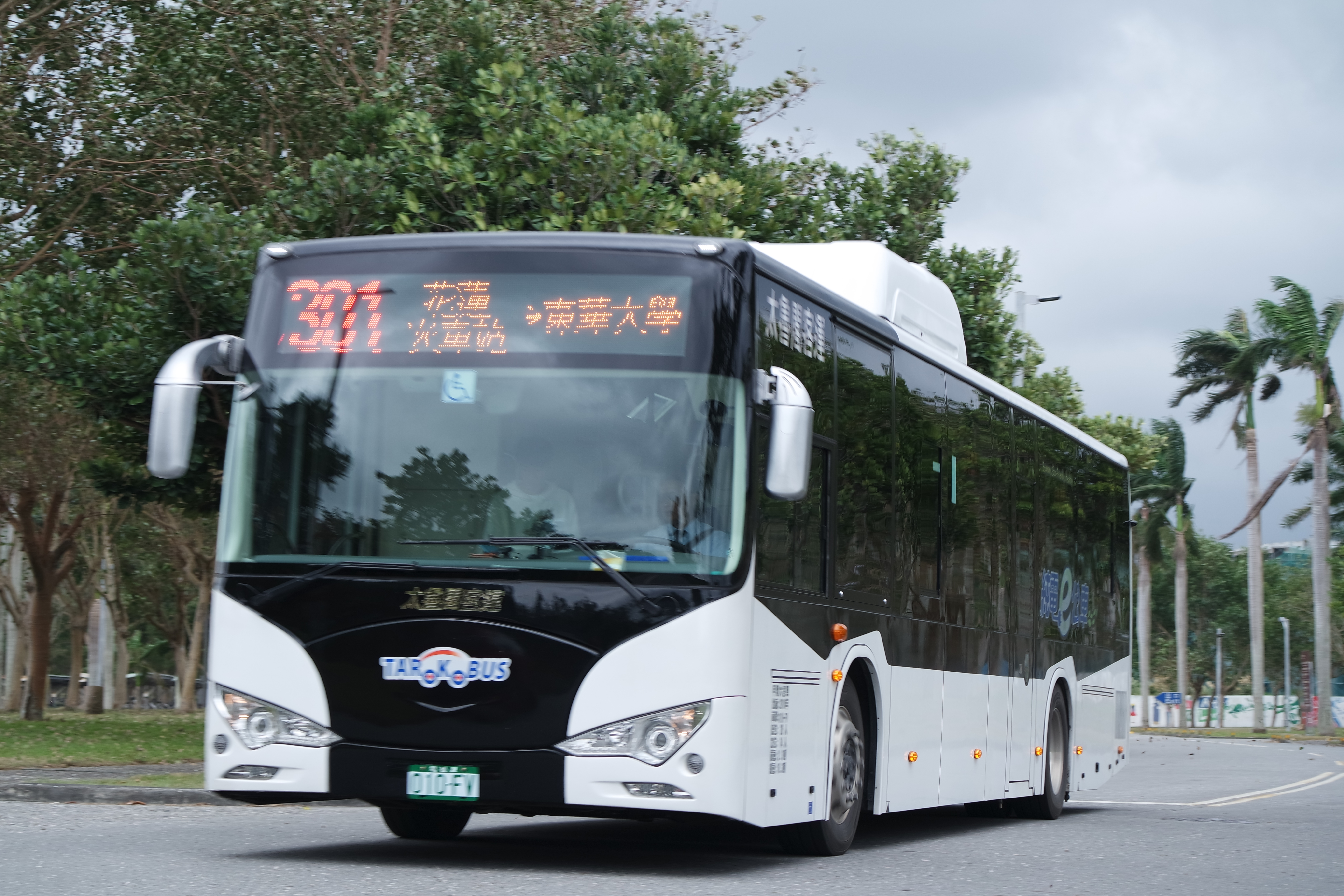 中文（台灣）: 太魯閣客運BYD低牀電動公車010-FV 攝於國立東華大學